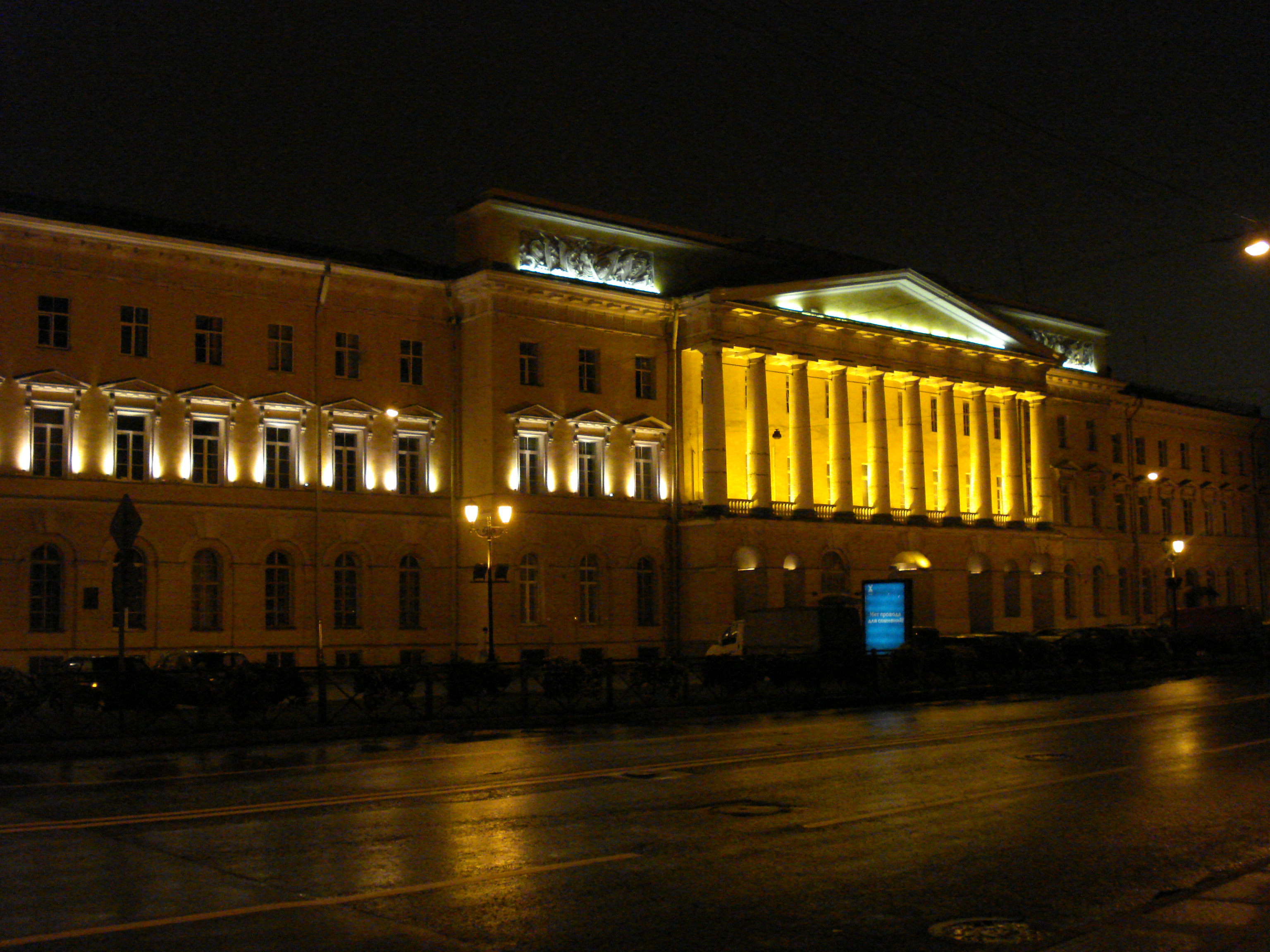 казармы Павловского полка, Марсово поле, 1, Миллионная ул., 2, Аптекарский пер., 2